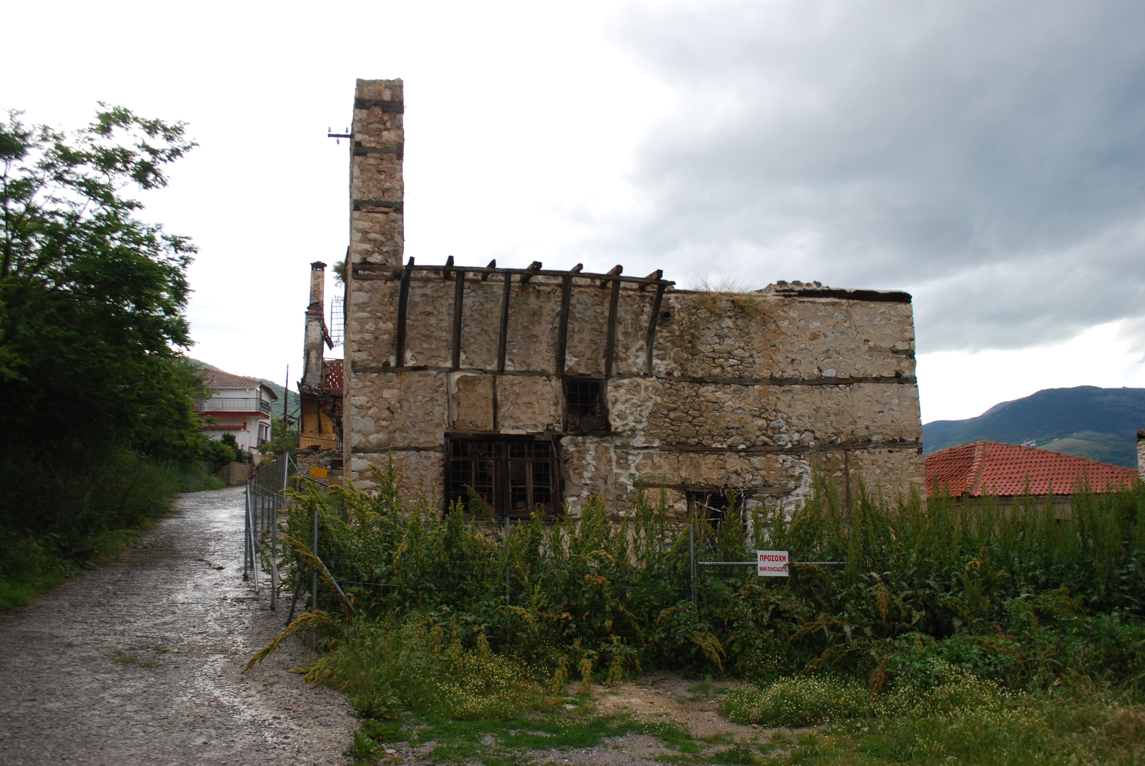 Vue de Kastoria.